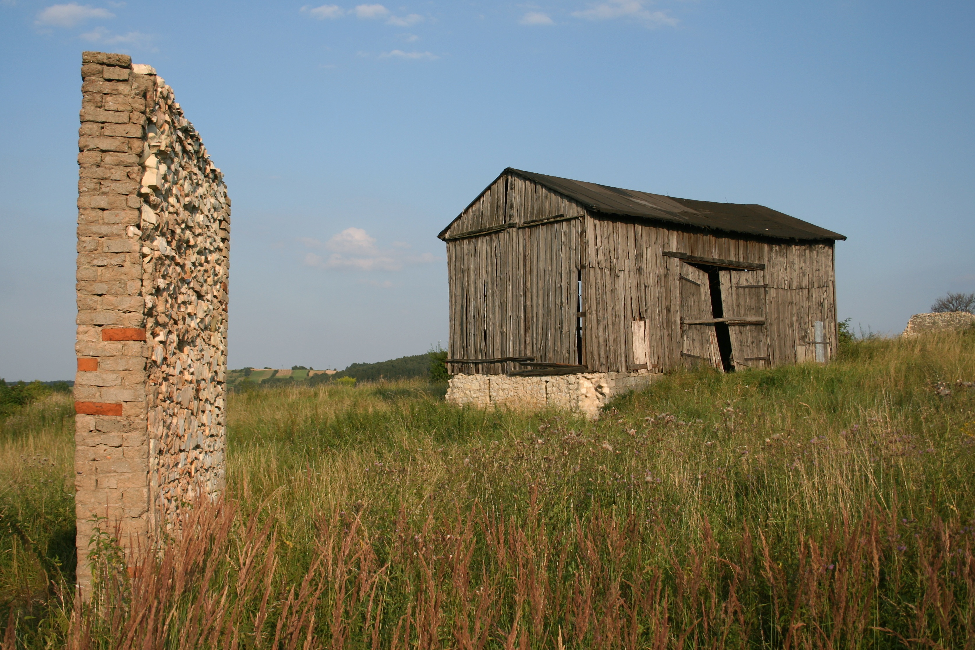 Stodoła w "dzielnicy stodół" w Mstowie , woj. śląskie